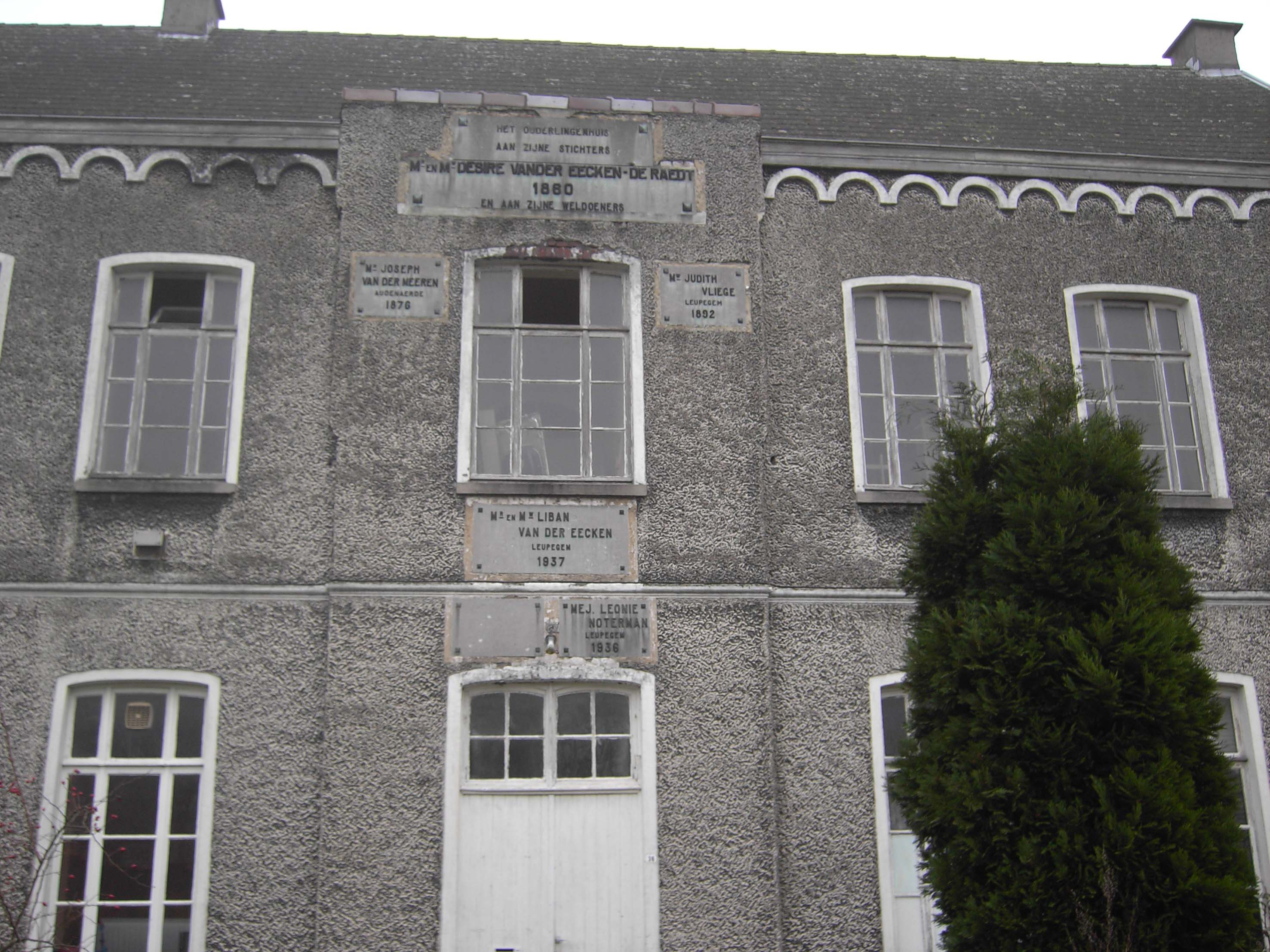 Leupegem in Oudenaarde in België - Allerlei namen van weldoeners op de gevel van een voormalig ouderlingenhuis.